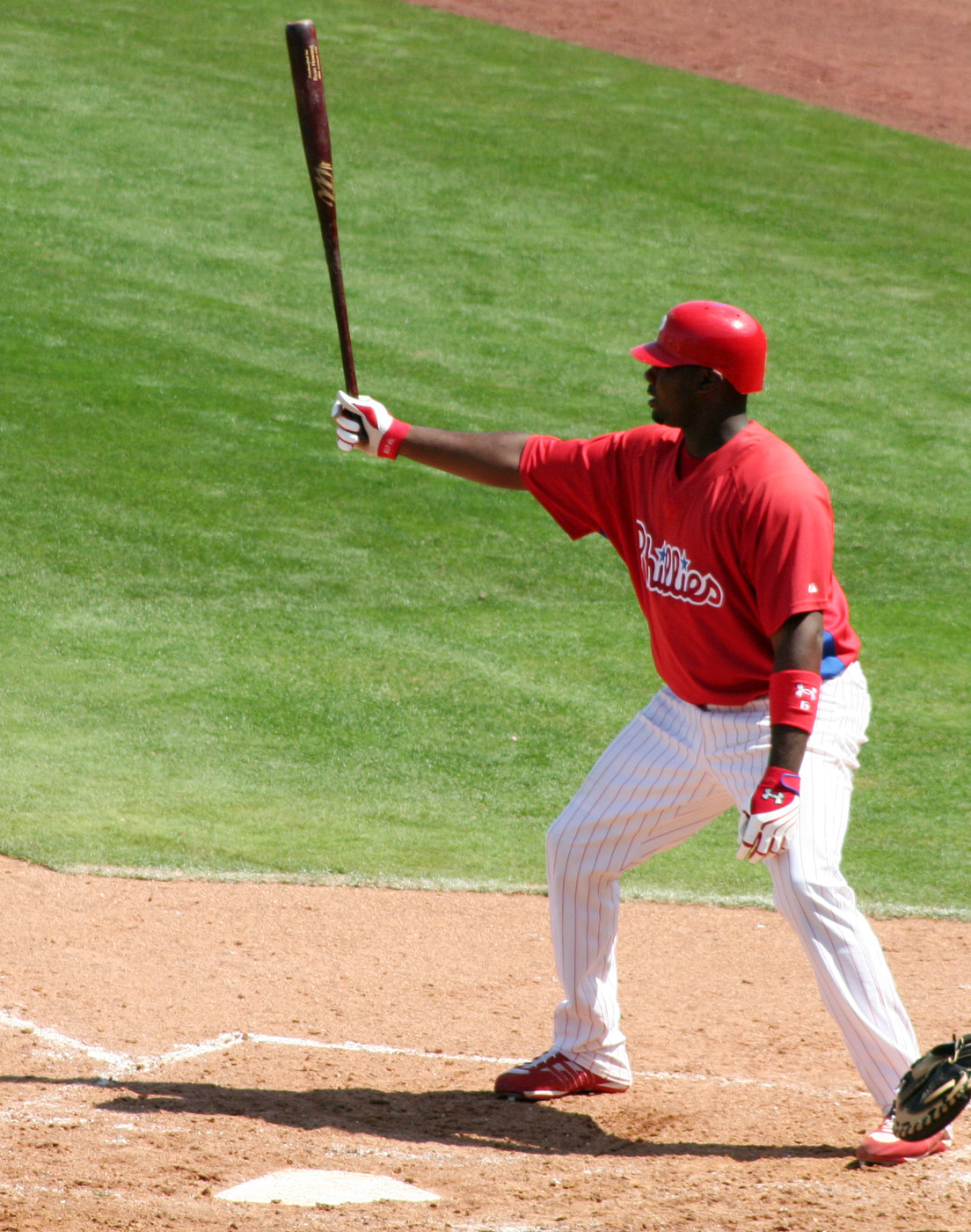 Ryan Howard 14:22, 24 April 2007 . . Googie man . . 1104×1400 (545,611 bytes)